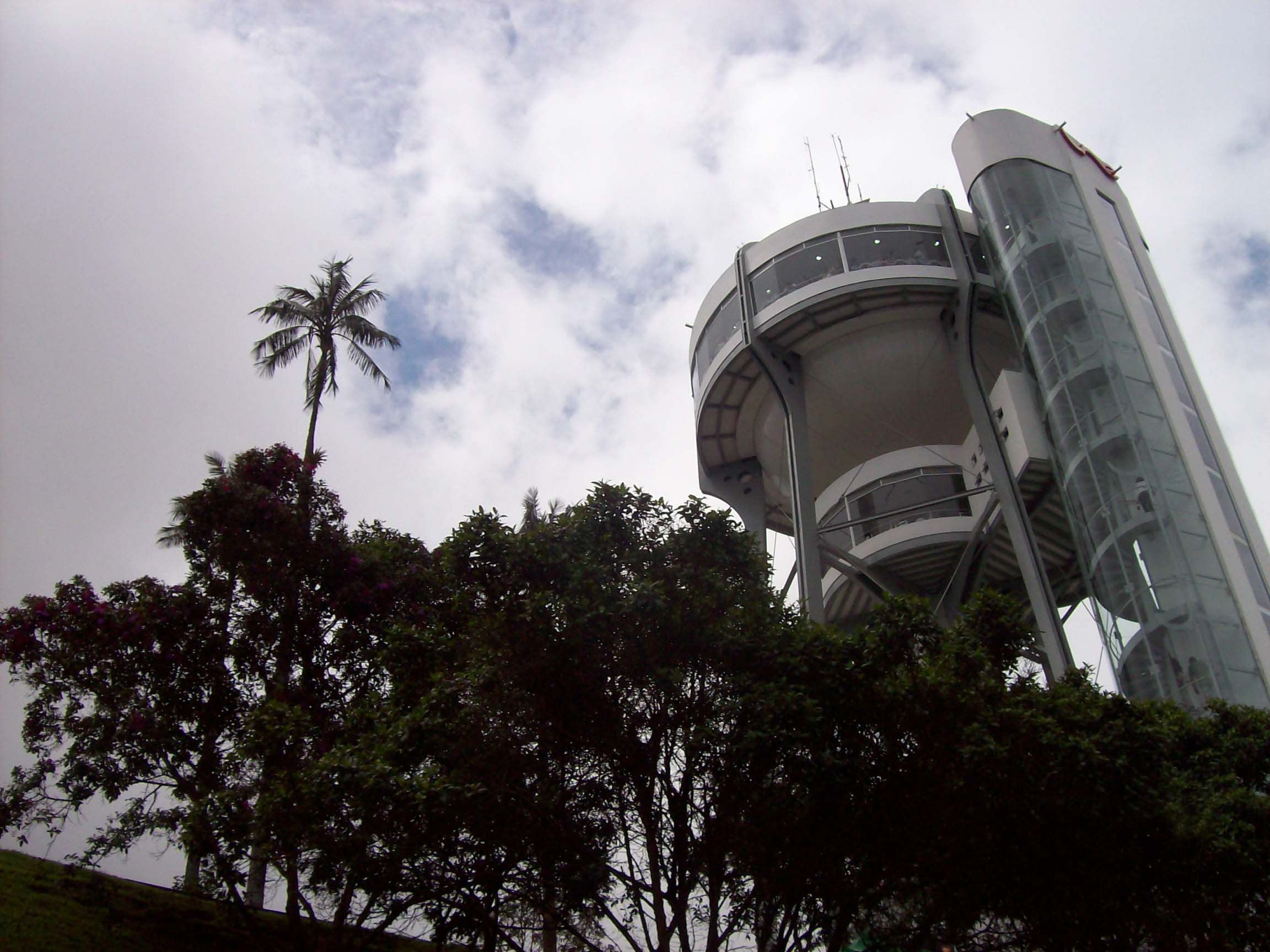 Torre al Cielo: torre mirador tanque de Chipre